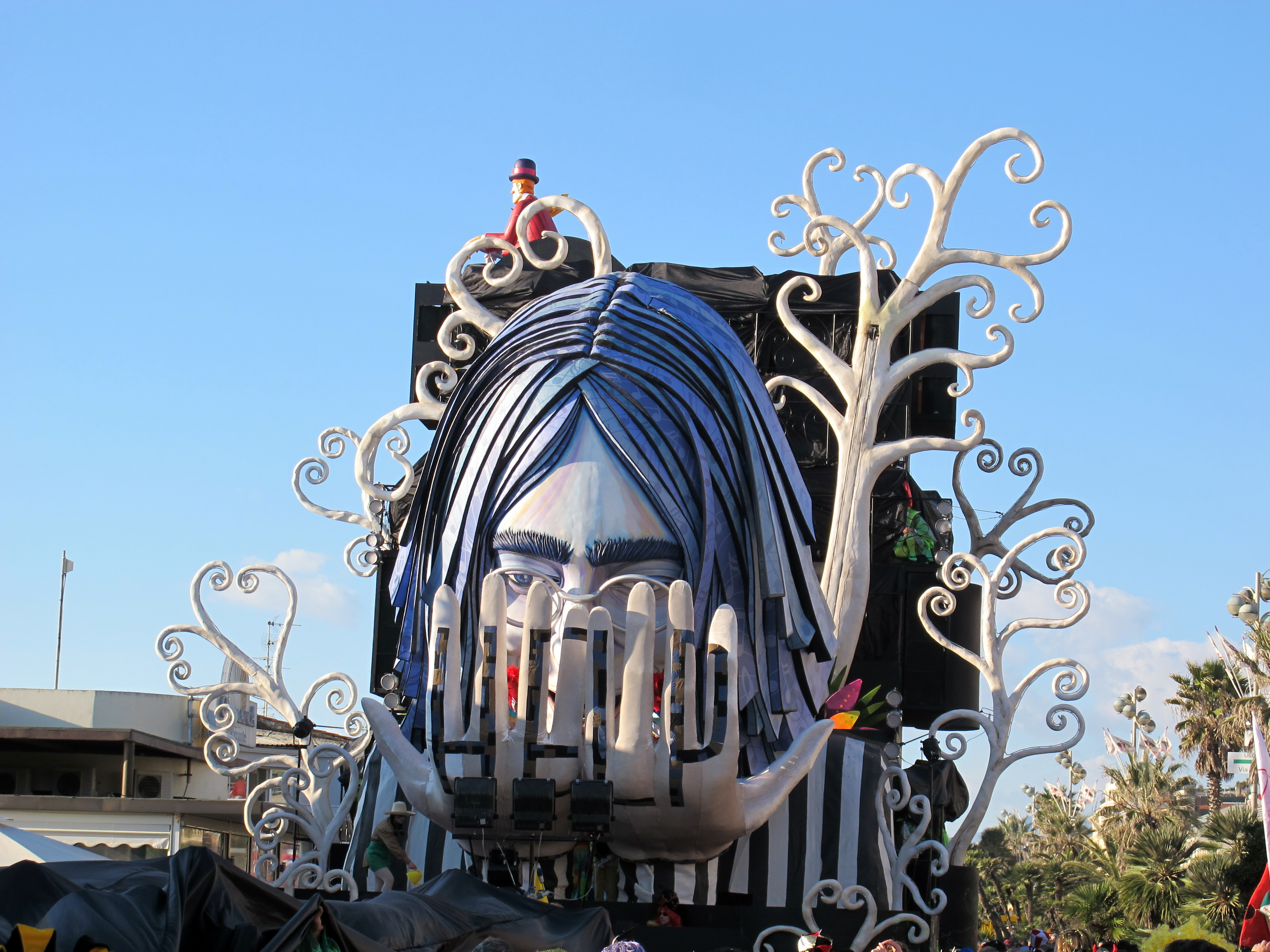 Viareggio